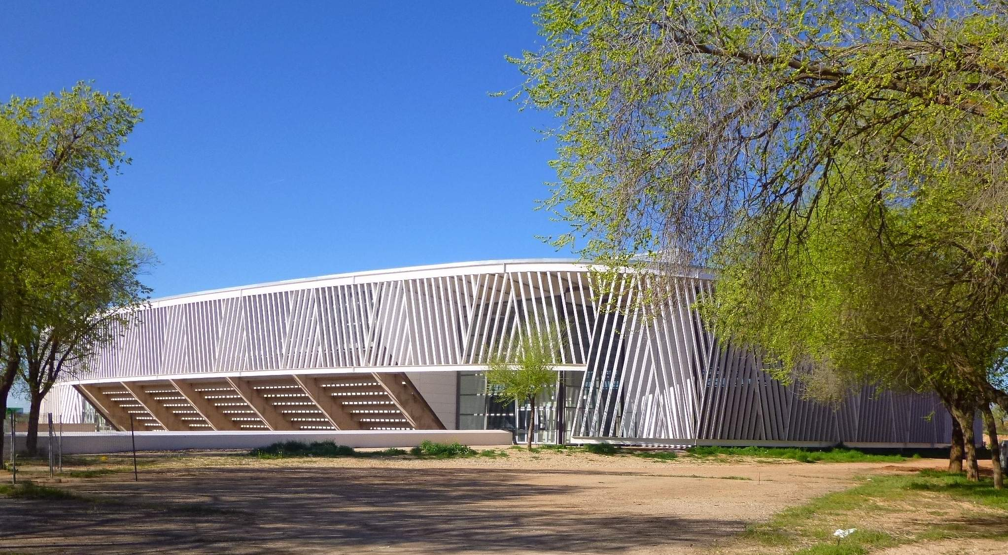 Pabellón deportivo multiusos Vicente Paniagua, inaugurado en Alcázar de San Juan (Ciudad Real) en 2015